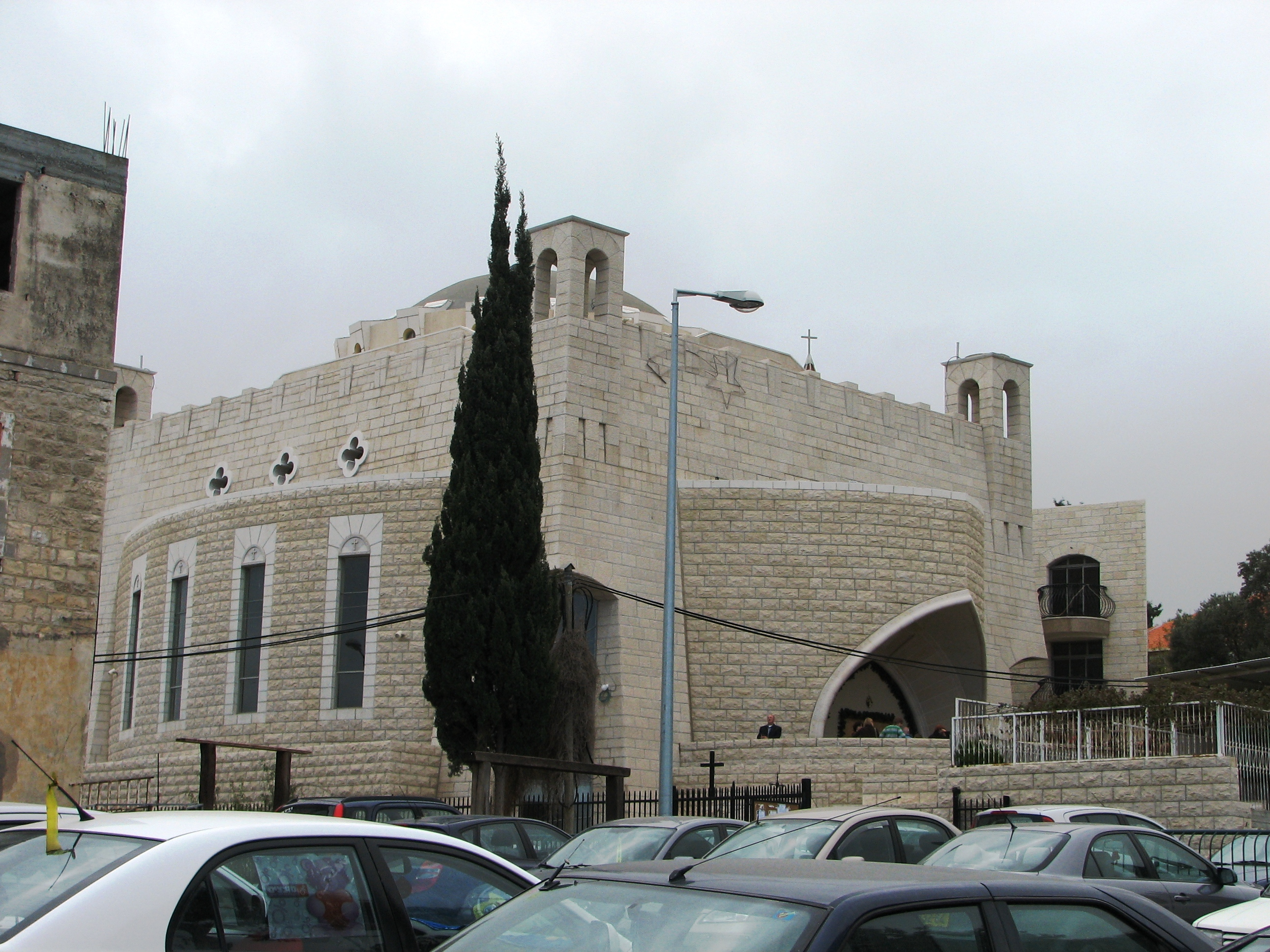 John the Baptist church, Haifa Israel כנסית יוחנן המטביל - הכנסייה היוונית האורתודוכסית החדשה רחוב הפרסים 3 חיפה